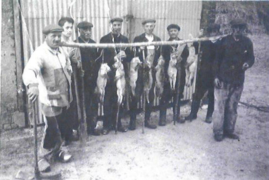 Battue aux renards dans la Sarthe (France).